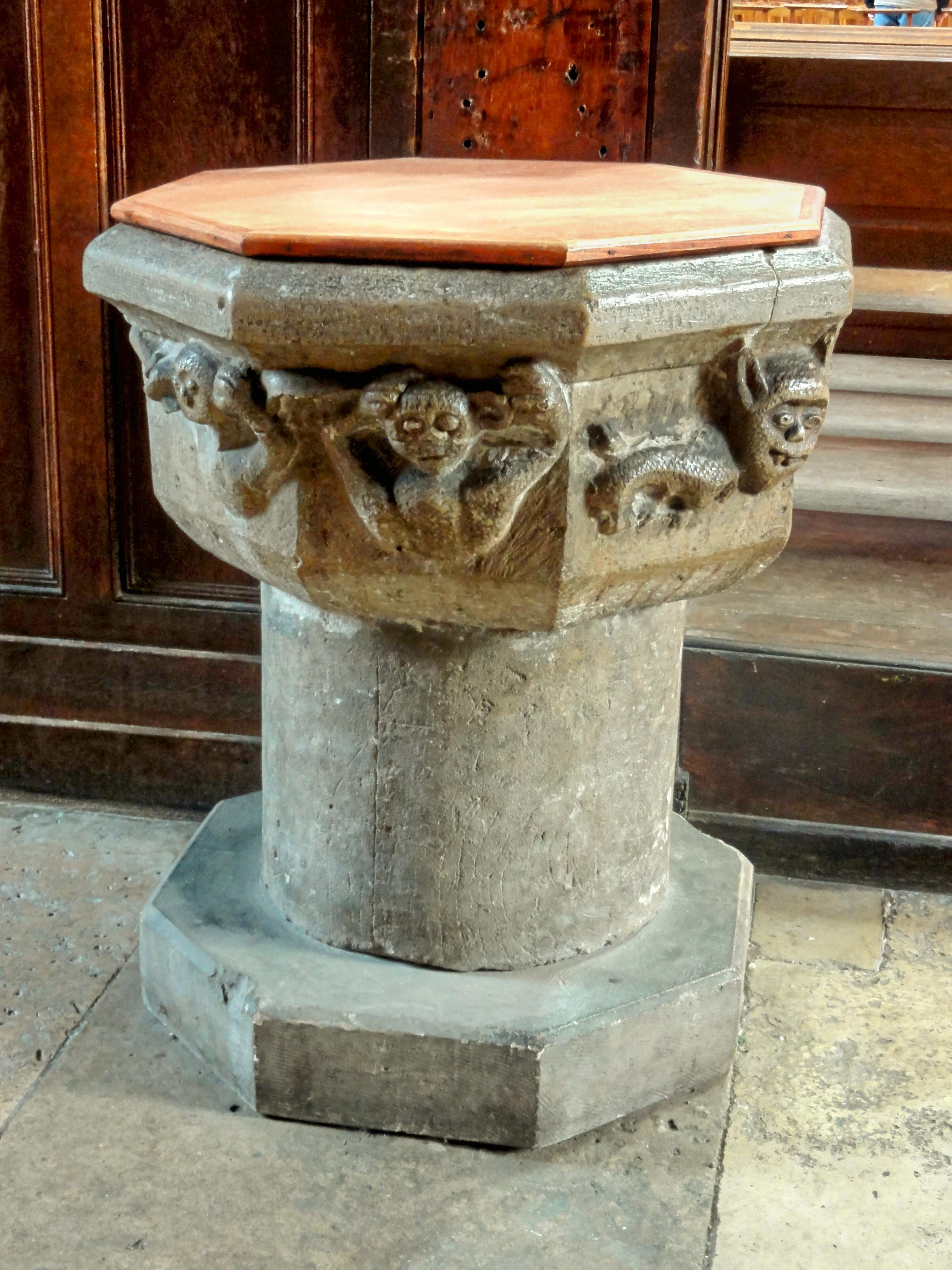 Le bénitier du XIIe (ou plutôt du XIIIe) siècle.